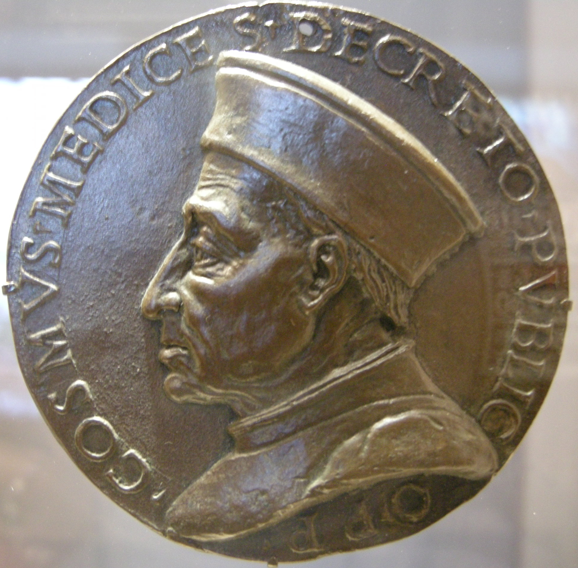 Artista fiorentino, cosimo de' medici pater patriae, 1465-69, recto